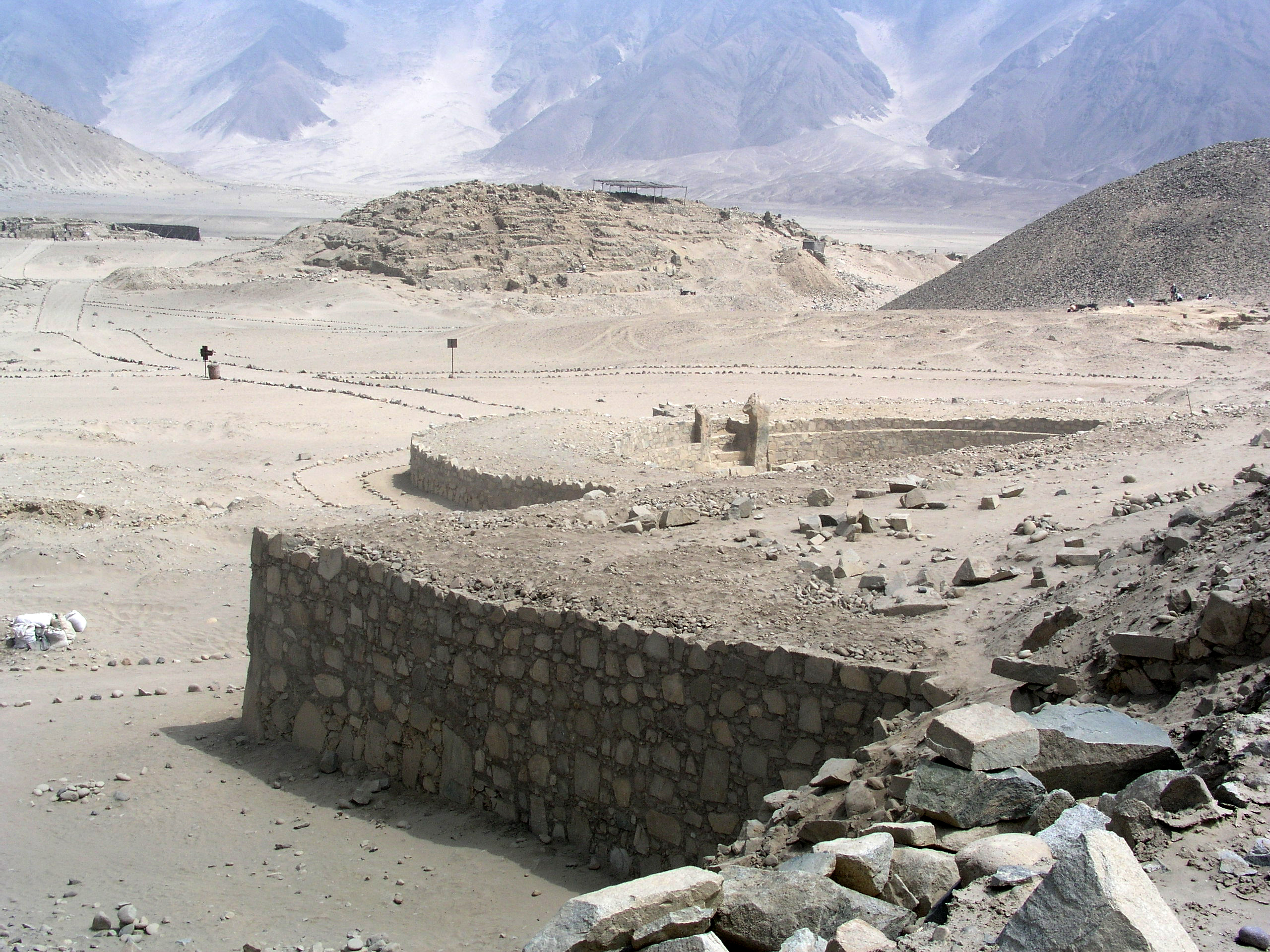 Pirámides en Caral, Valle de Supe, Region Lima, Peru.